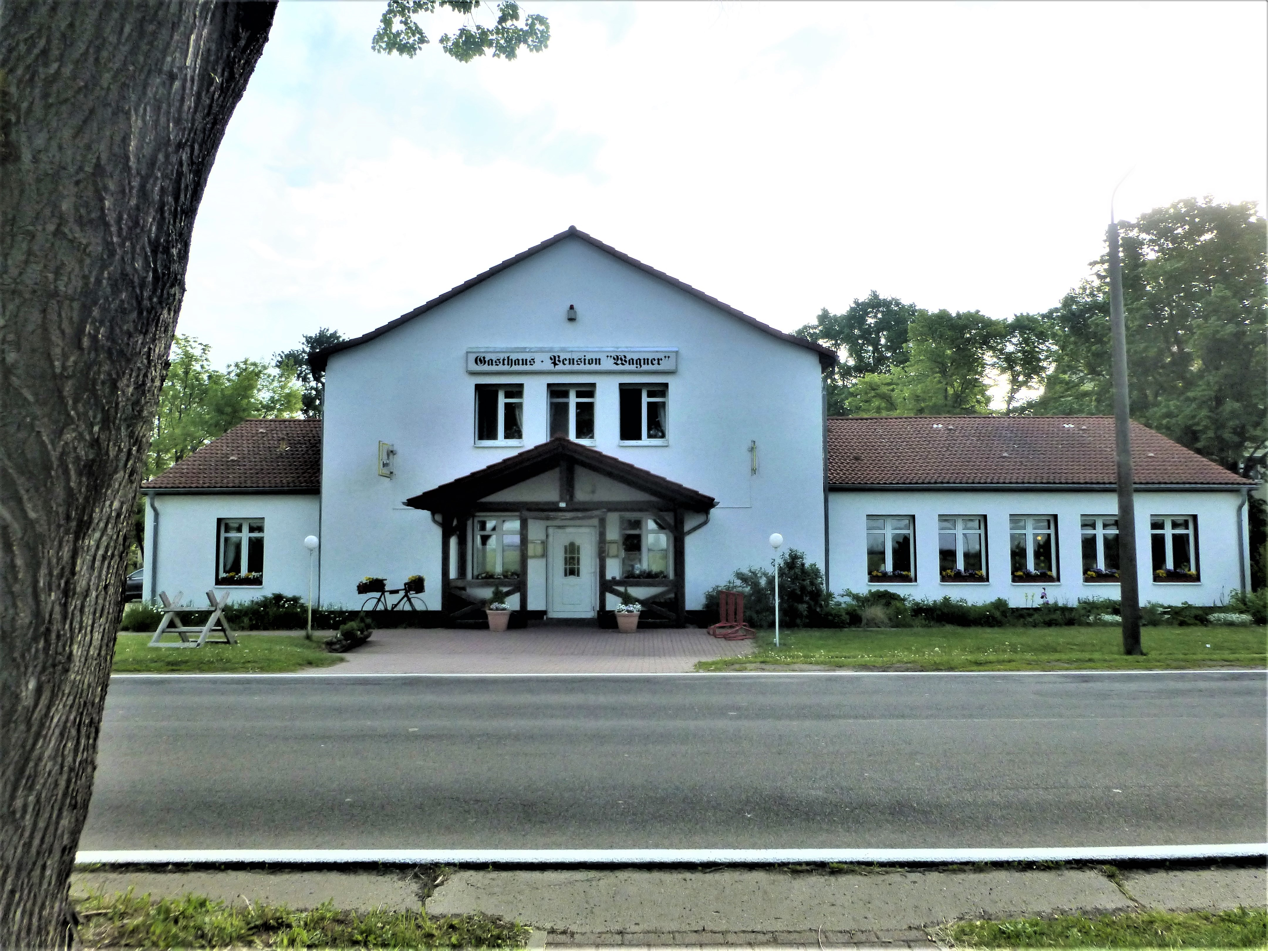 Golzow: Gasthaus Wagner